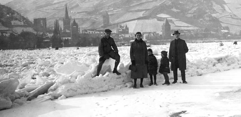 Der zugefrorene Rhein bei Bacharach 1929; Selbstauslöser/Stativ, Hermann Michel links im Bild (Übrige unbekannt), Kamera vermutlich: Voigtländer, Plattenkamera